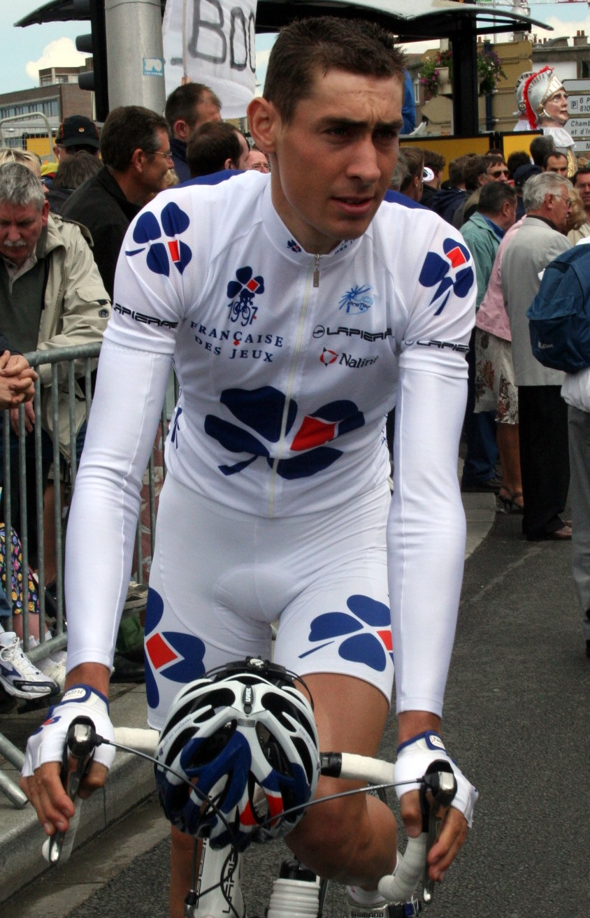 Matthieu Ladagnous au départ de l'étape de Dunkerque - Tour de France 2007